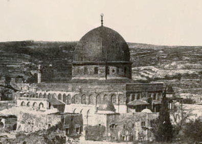 Mosquée d'Omar, côté ouest - Jerusalem.